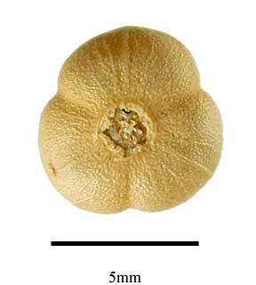 Peganum harmala seed cluster